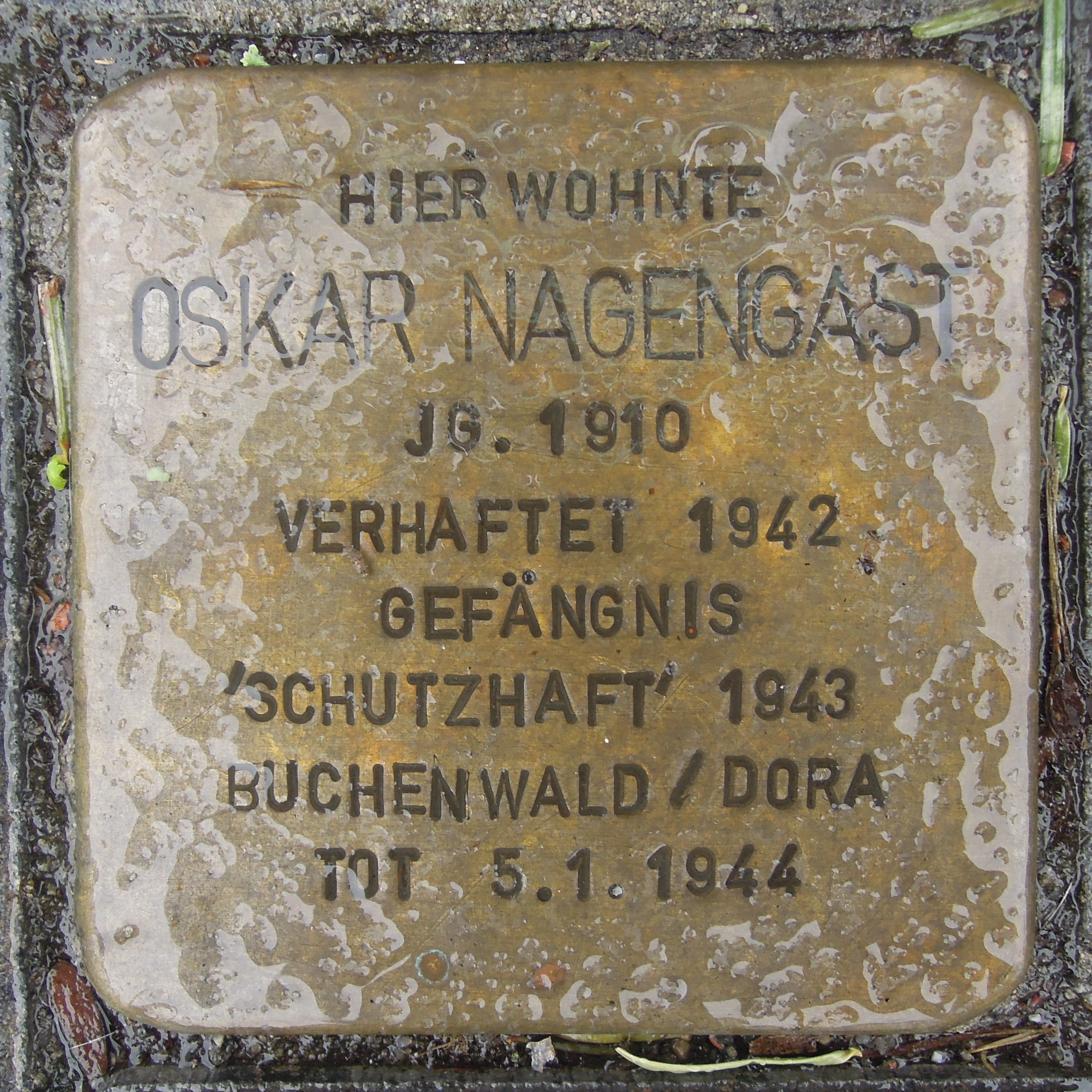 Stolperstein Hattingen Bruchstraße 41 für Oskar Nagengast